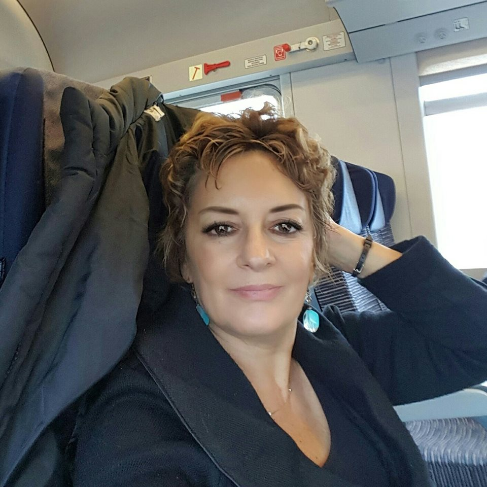 Silvana Maja